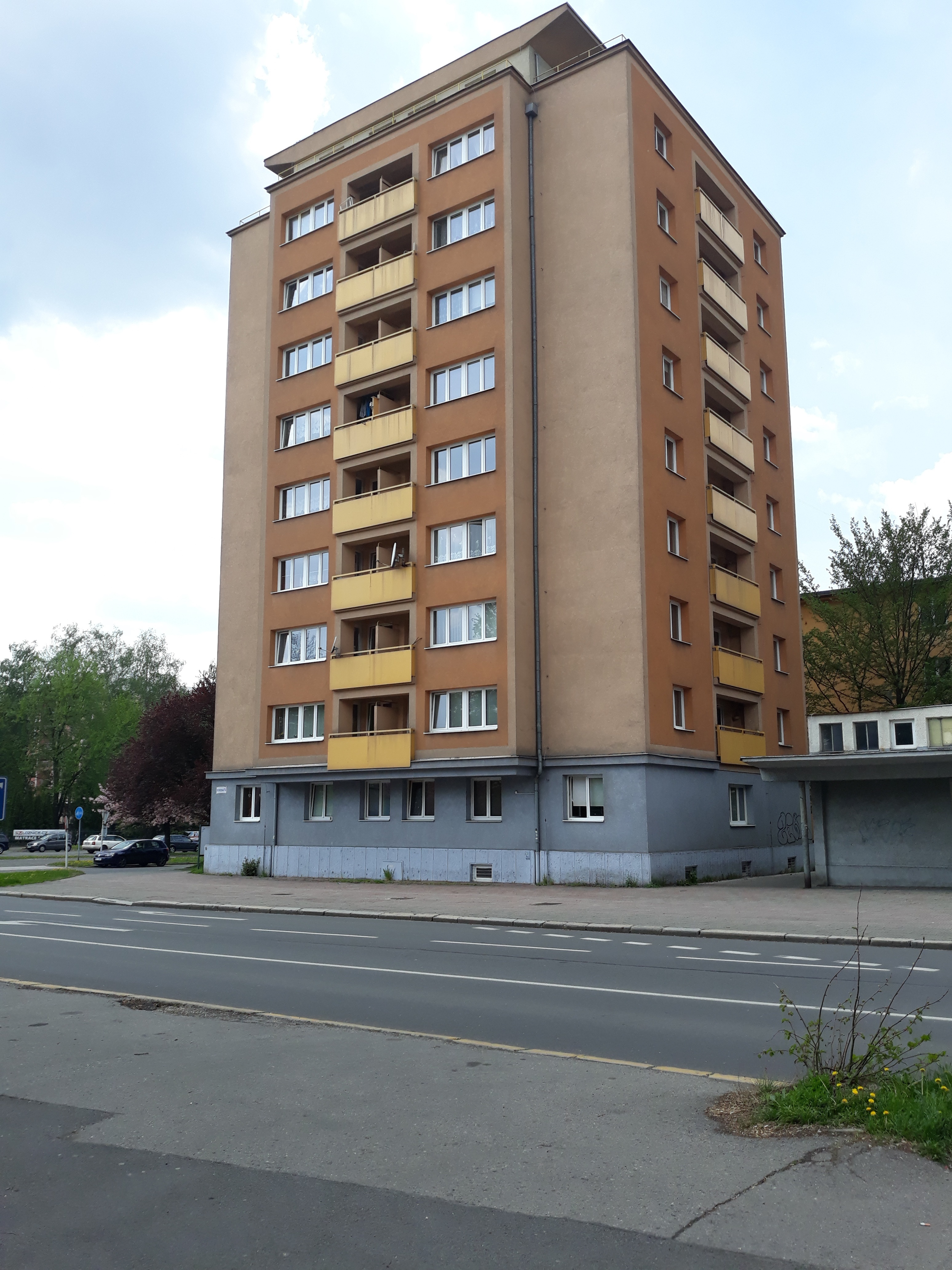 Panelový dům v Karviné. Božkova 542/41, z ul. Kosmonautů.